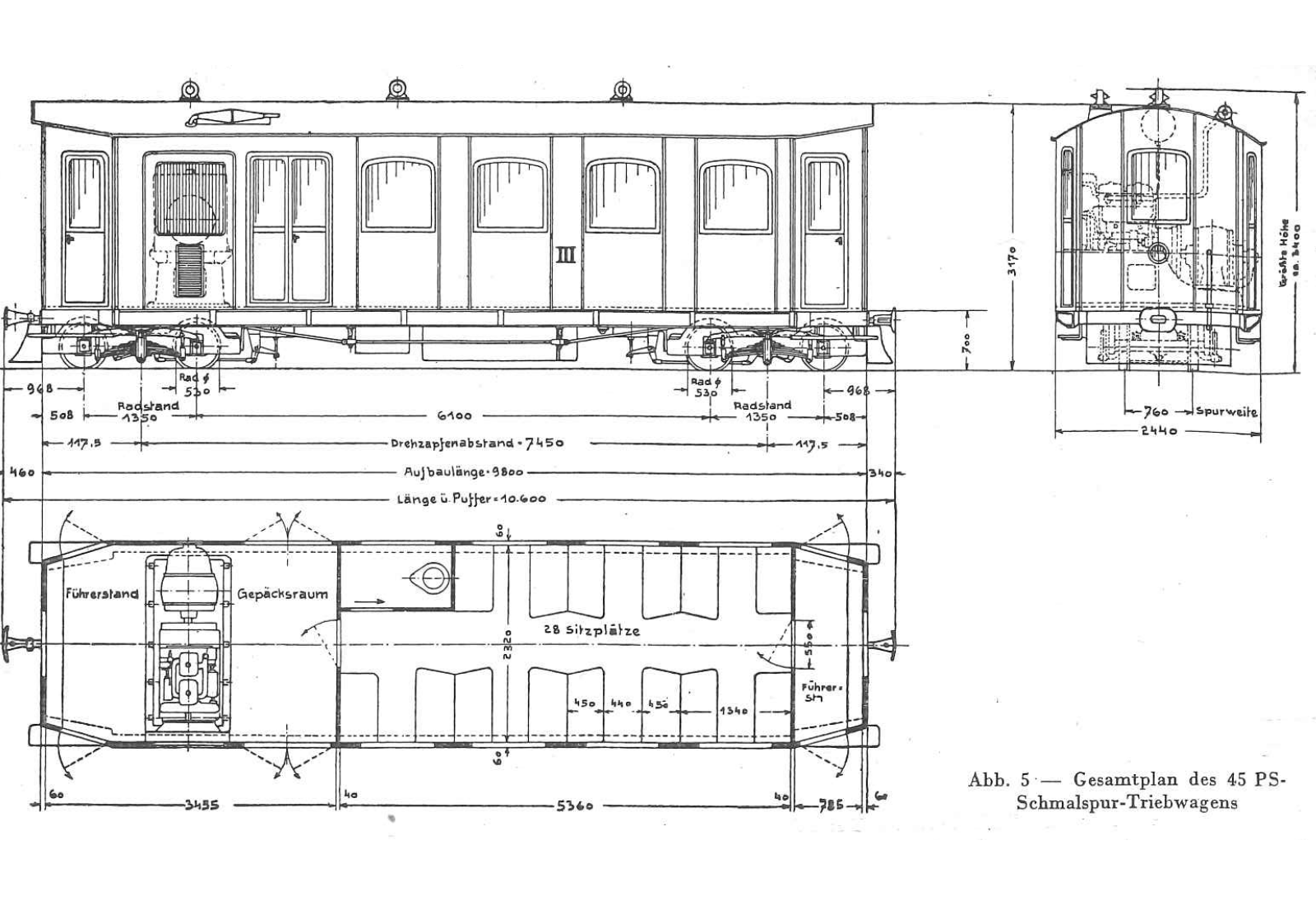 Massskizze des Schmalspurtriebwagens der SKGLB